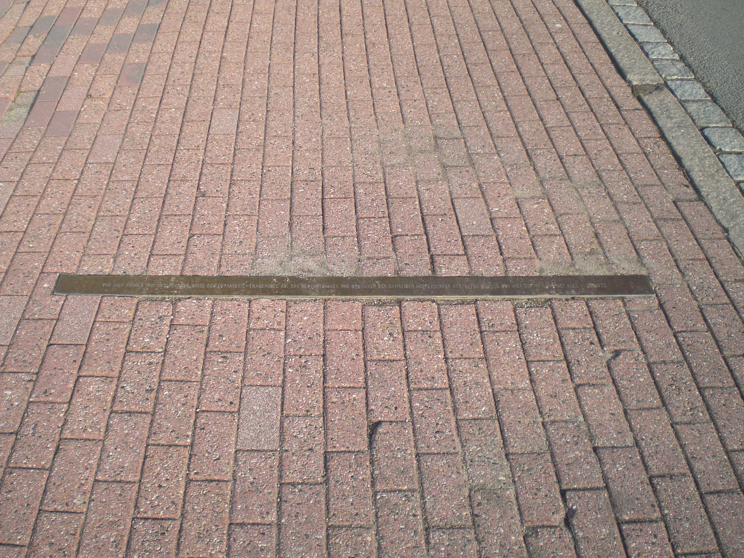 Stolperschwelle mit den Zahlen der Deportierten und Ermordeten. Die Stolperstelle ist an der Stelle verlegt, an der die Busse abfuhren, mit denen die Opfer deportiert wurden. Inschrift: "Von hier fuhren 1941 und 1943 die Busse der Euthanasie-Transport ab. 539 Bewohnerinnen und Bewohner der damaligen Alsterdorfer Anstalten wurden von hier deportiert. Fast alle in den Tod."